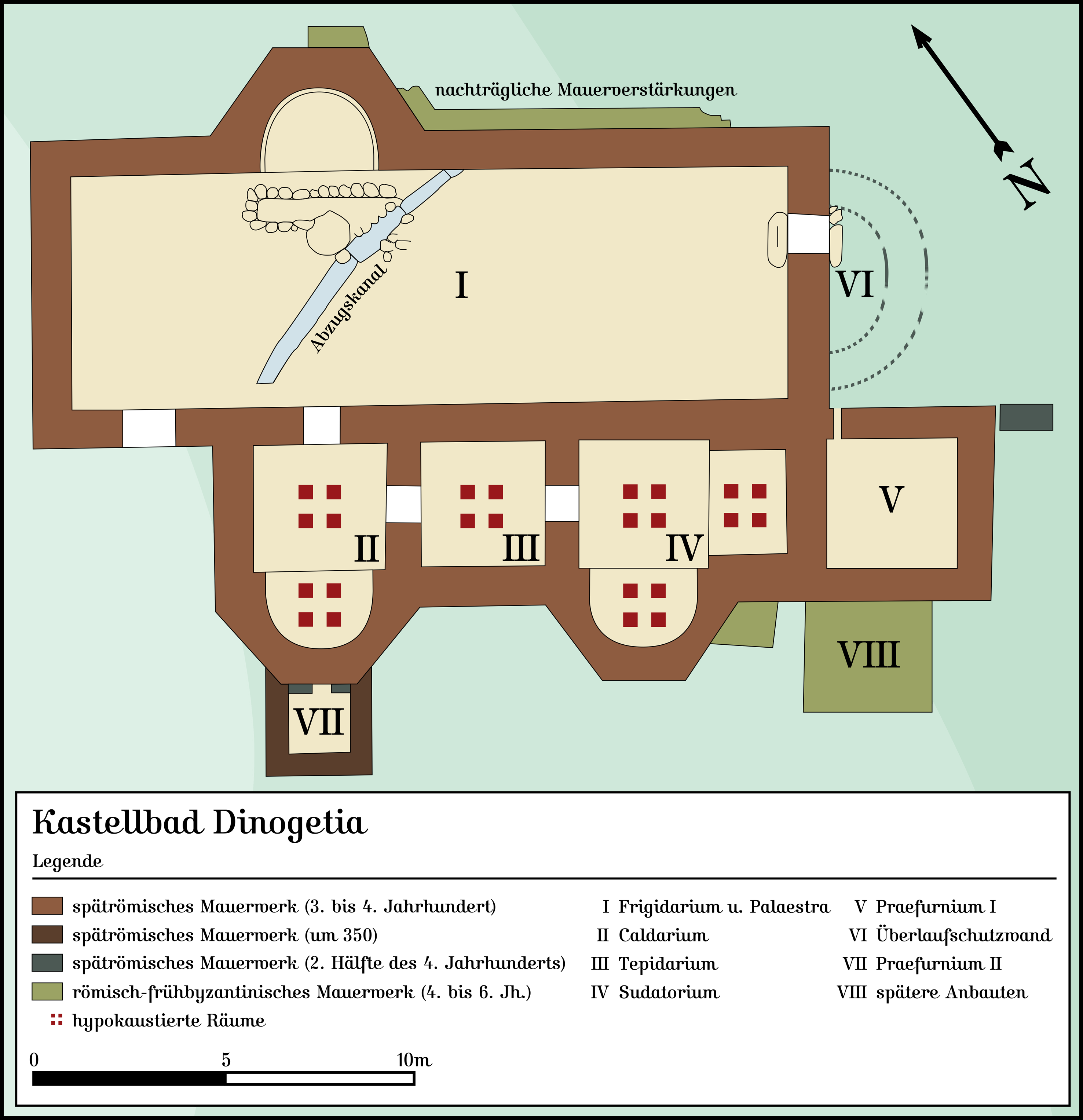 Die aus dem 3. oder 4. Jahrhundert stammende Kastelltherme von Dinogetia wurde bis ins 6. Jahrhundert verwendet. Hergestellt am Macintosh unter Macromedia Freehand MX; abgespeichert für Wikipedia unter Adobe Photoshop CS 2.